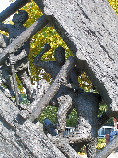 Bergarbeiterdenkmal "Steile Lagerung" vom Bildhauer Max Kratz, 1989 in Essen enthüllt